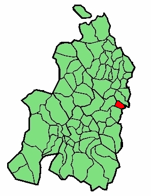 aipaturiko udalerriaren kokapena Nafarroa Beherean